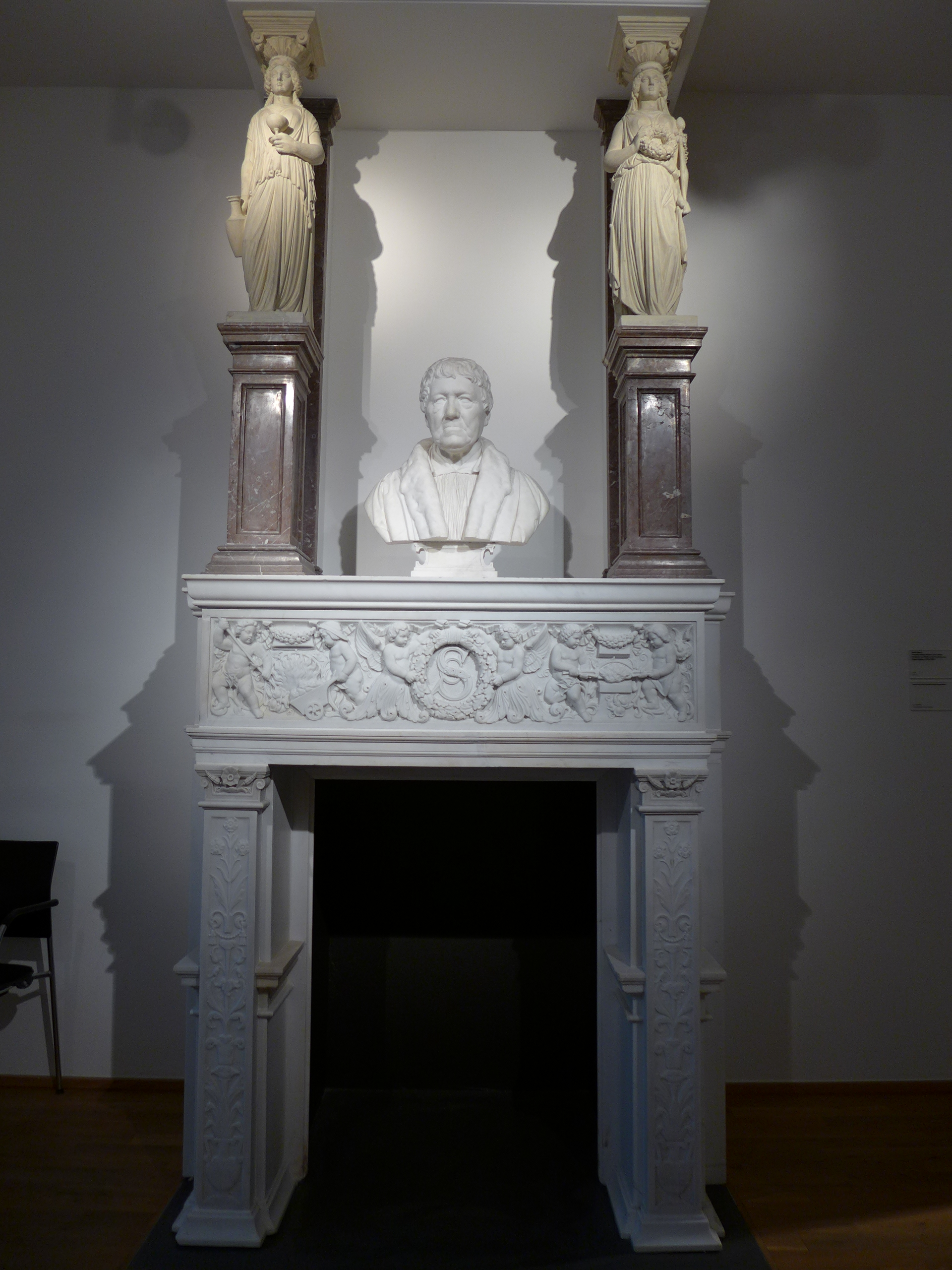 Porträtbüste Friedrich Philipp Stumms um 1835 von Eduard Mayer (1812-1881), Kamin aus dem Stummschen Herrenhaus um 1835-1840, Carrara-Marmor und roter Marmor, Saarland-Museum